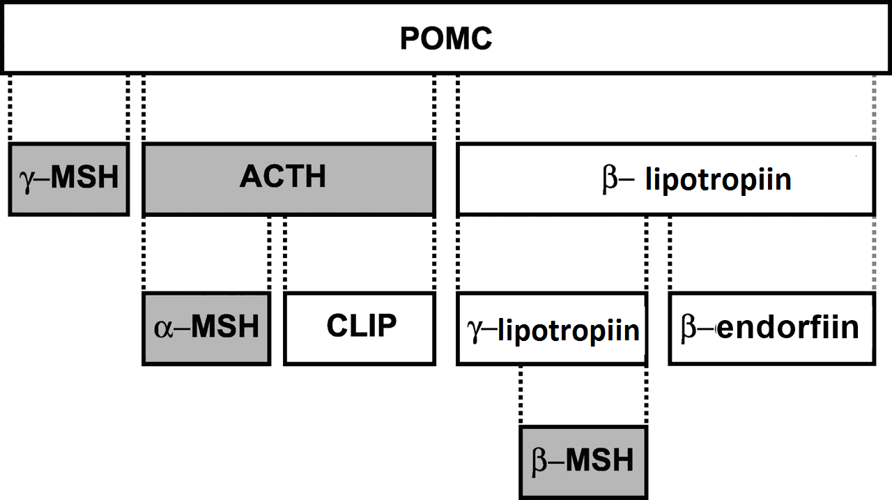 Proopiomelanokortiini hüdrolüüsi skeem